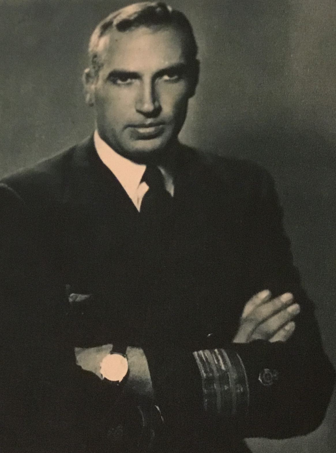 Este es el Dr. Luis Santomá Casamor, un ayudante del reflotamento de la armada espanyola en la guerra civil.